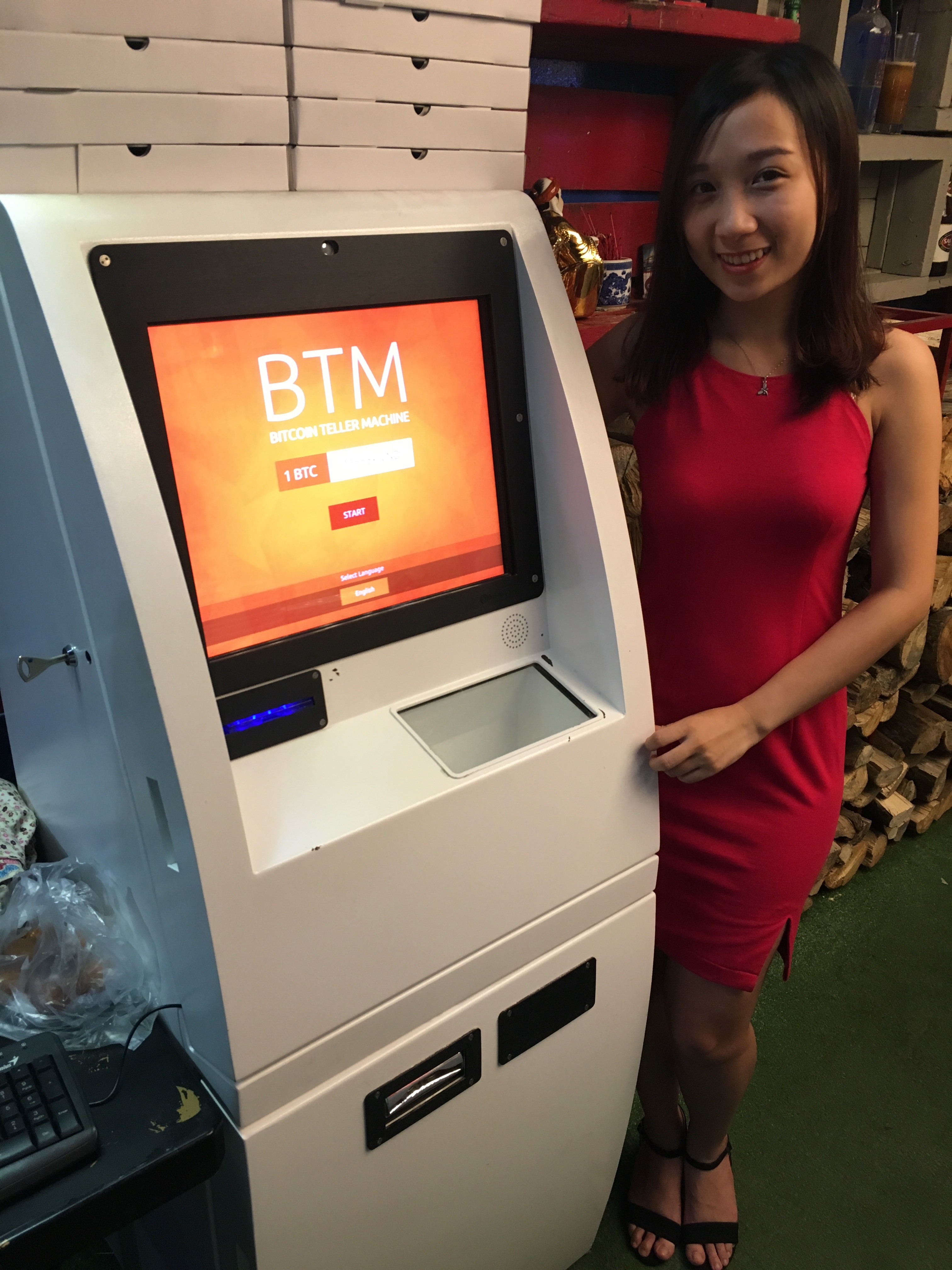 Máy Bitcoin ATM